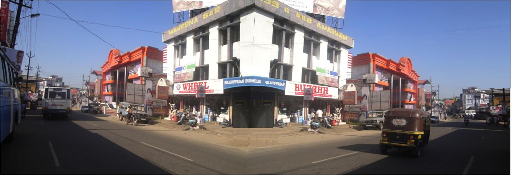 Changanassery Palace Road Kottayam District